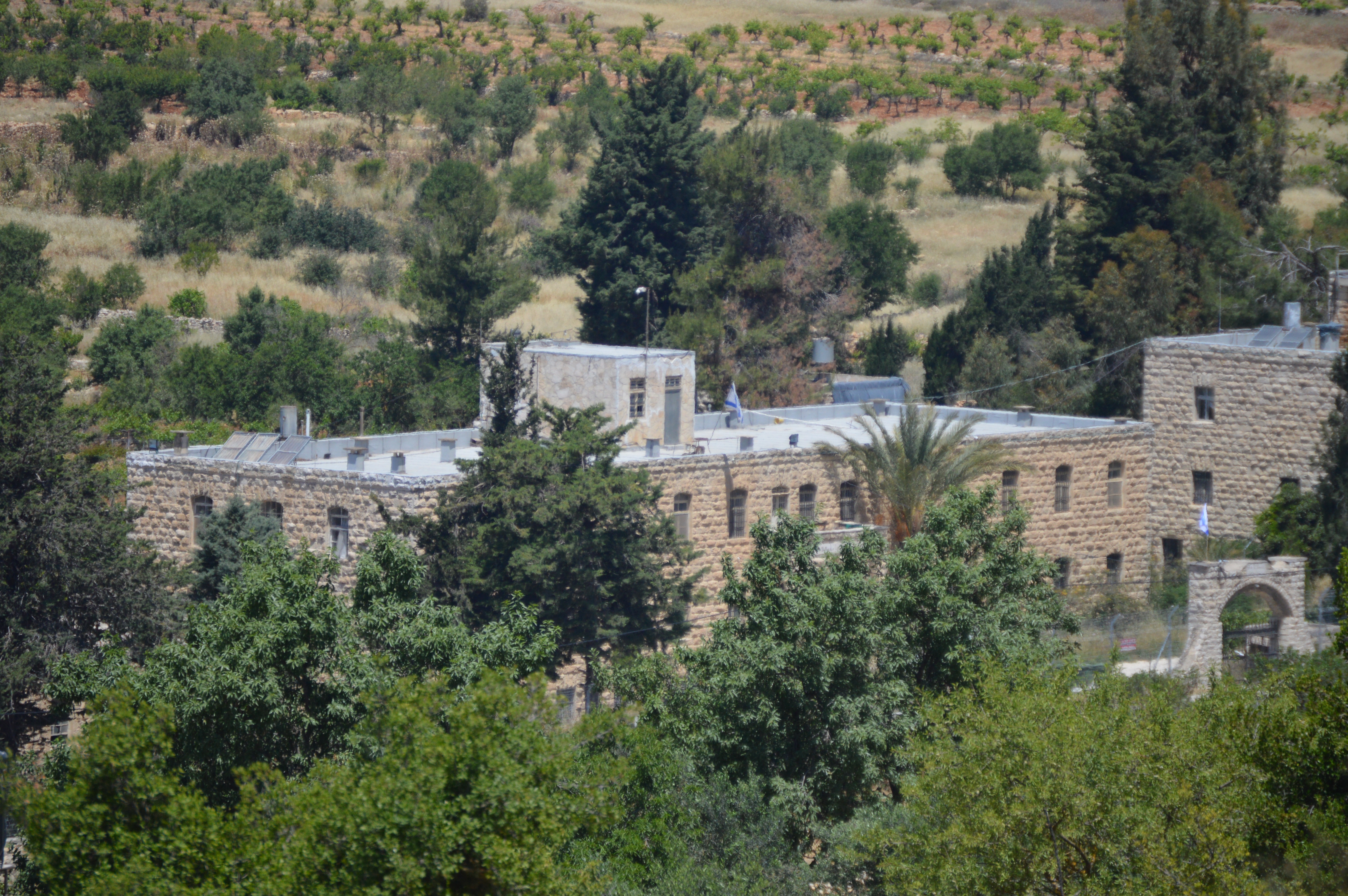 בית הברכה, מבט מדרום מזרח